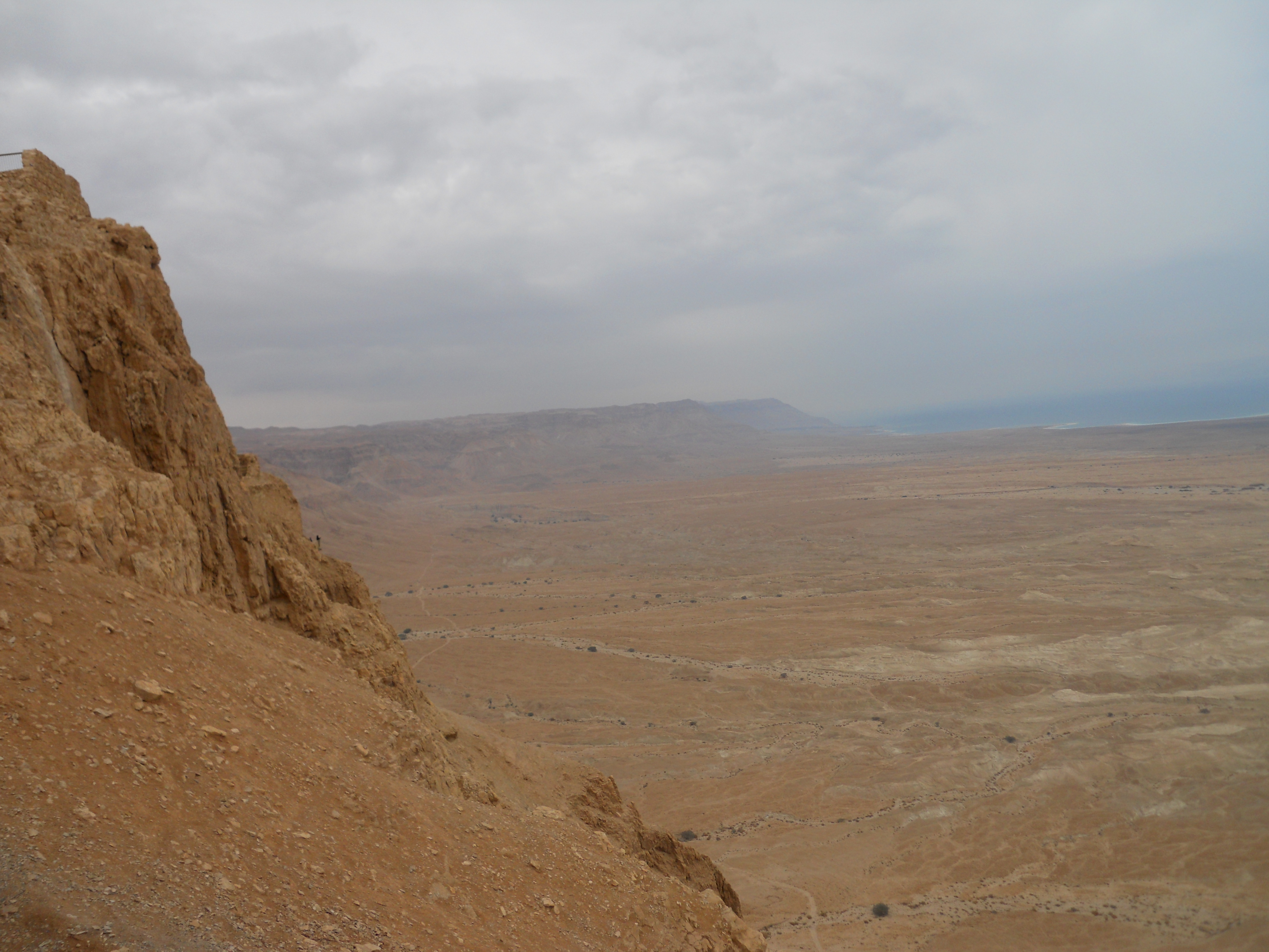 Judean Desert